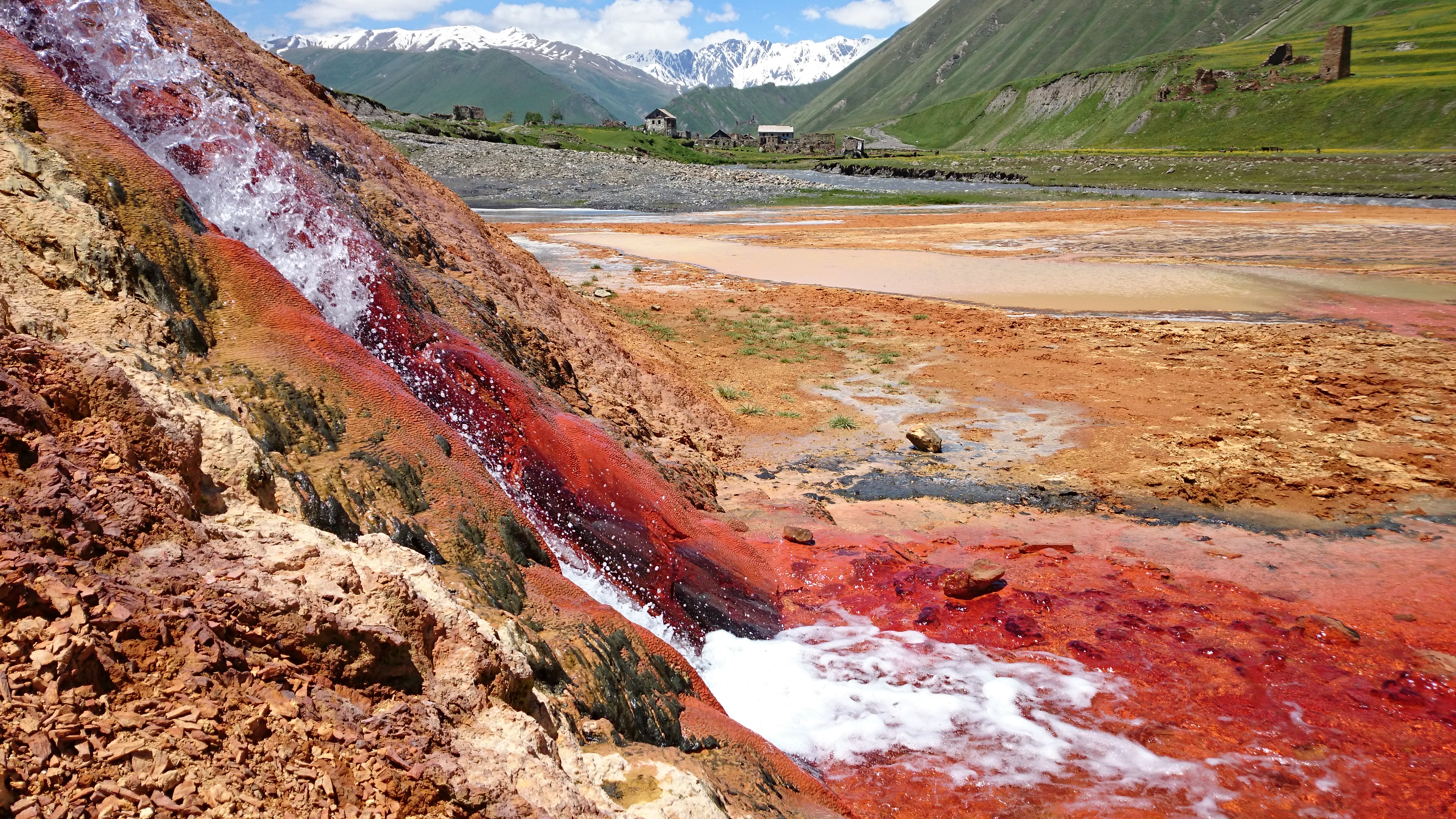 ლაშქრობა თრუსოს ხეობაში